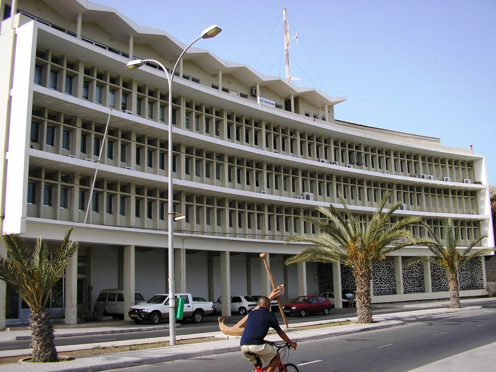 "Avenida Marginal" in Mindelo town, São Vicente island, Cape Verde